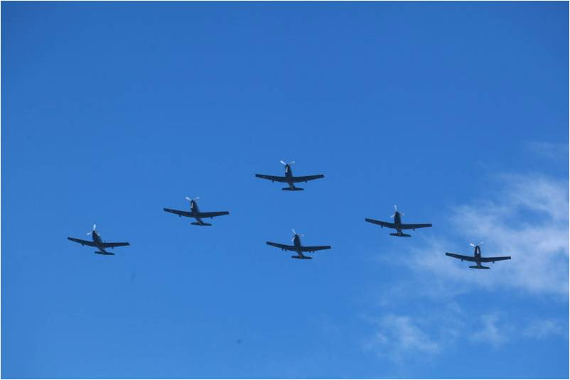 Equipo Acrobático E.M.A.A.T.F.A. en formacion delta